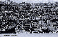 Singa River Boat Quay in the mid-nineteenth century